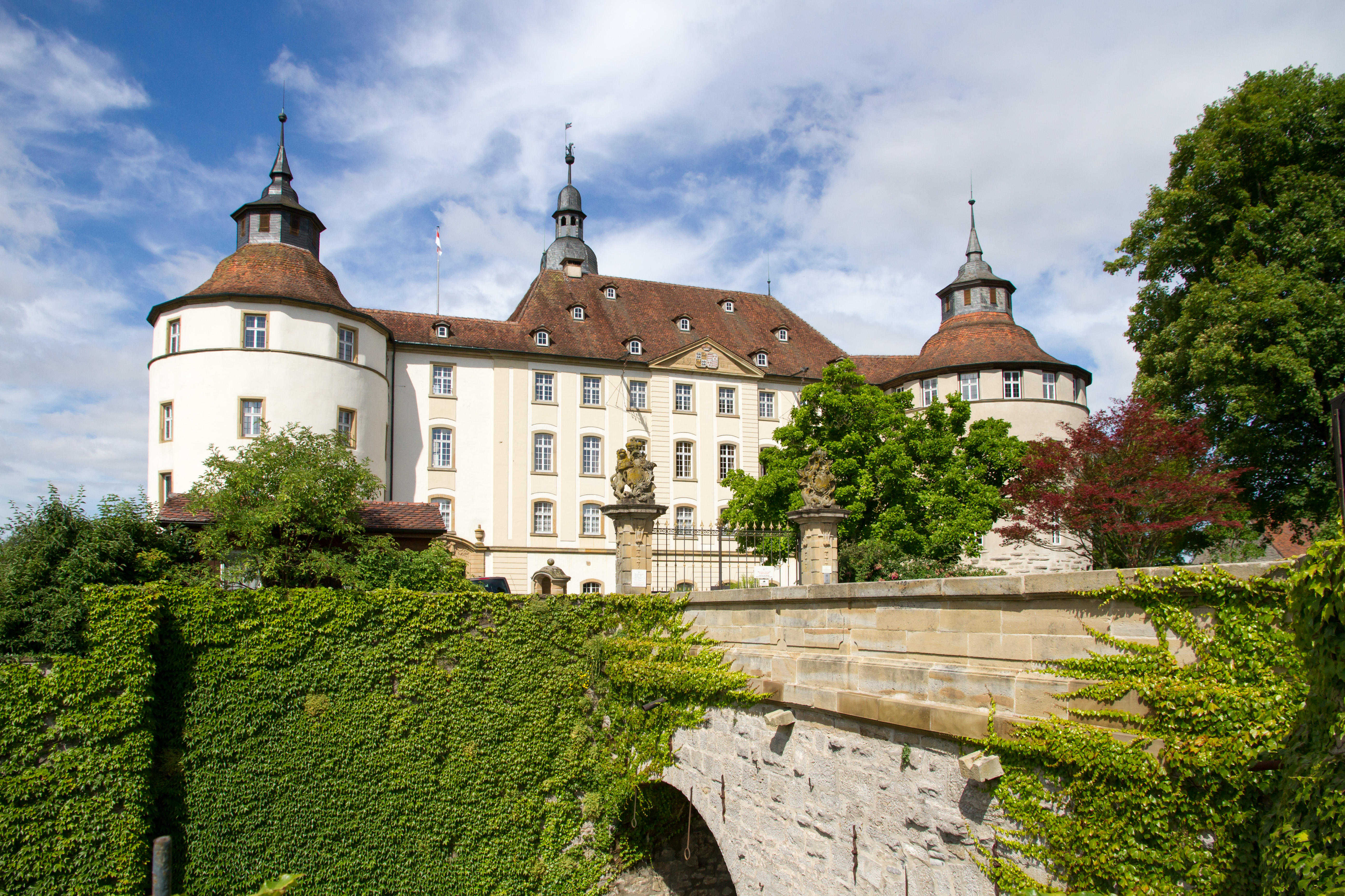 Schloss Langenburg